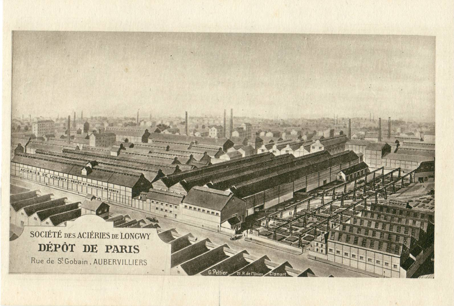 Carte publicitaire ancienne Société des Aciéries de Longwy - Dépôt de Paris - Rue St-Gobain - Aubervilliers